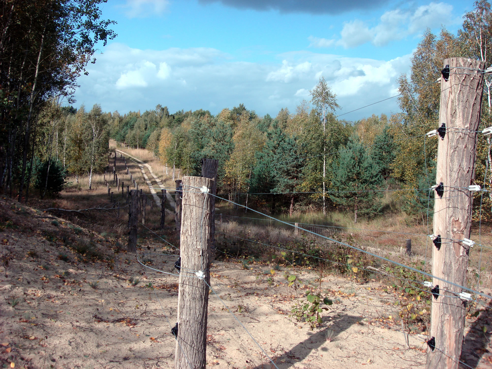 Döberitzer Heide – Das Bild zeigt den doppelten Elektrozaun um die Kernzone des Naturschutzgebietes.